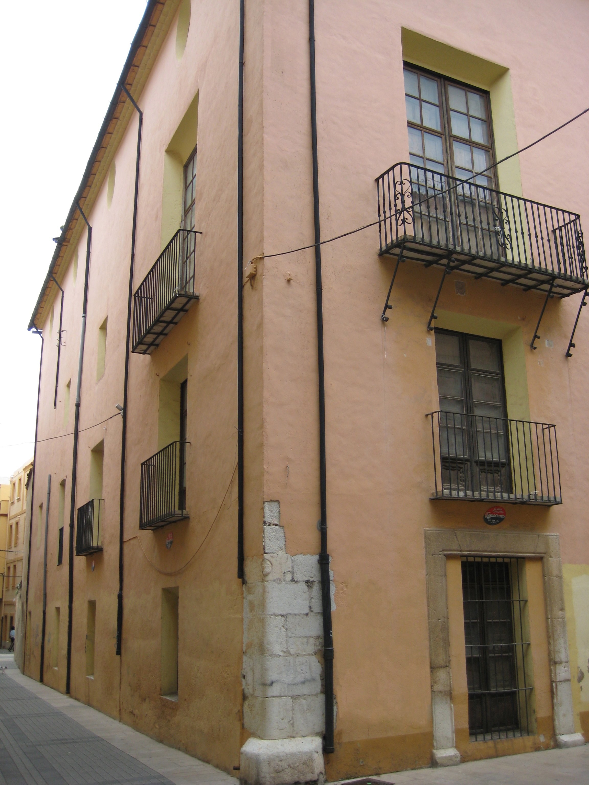 Façana lateral de la Casa del Marqués de Benicarló, en Benicarló (Baix Maestrat)